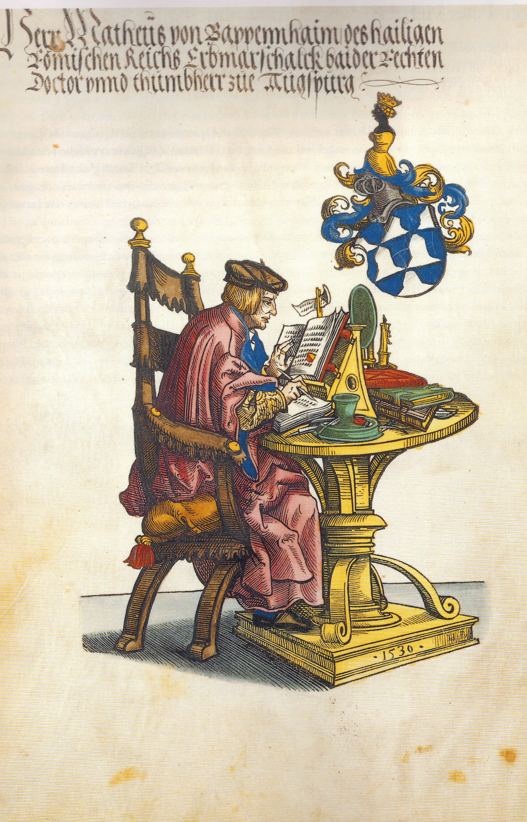 Matthäus Marschalk von Pappenheim, aus der Truchsessenchronik, Exemplar der WLB Stuttgart Cod. Donaueschingen 590 S. 2